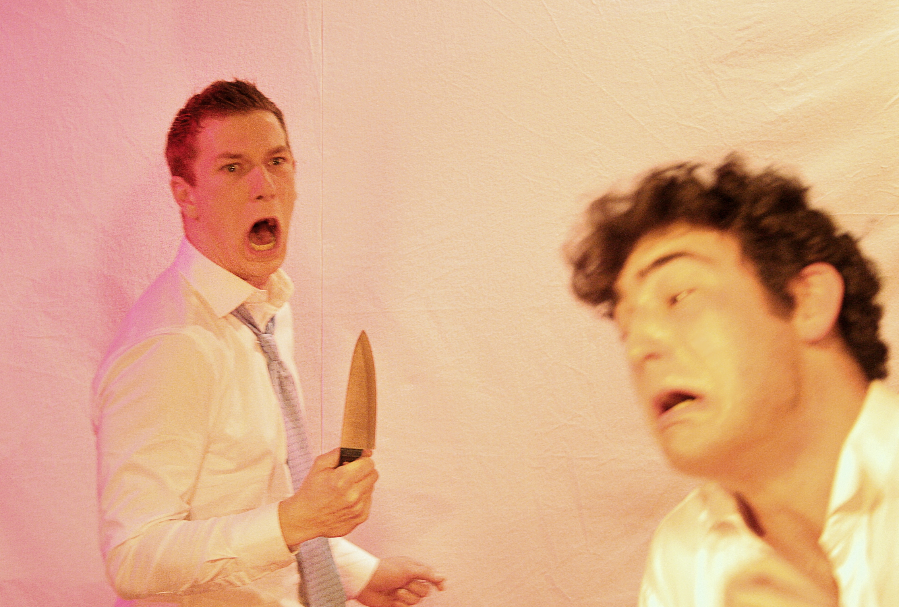 Szene aus einer Aufführung der Komödie Ein Traum von Hochzeit von Robin Hawdon unter der Regie von René Böttcher an der Studiobühne Siegburg (Lehrbühne der Schauspielschule Siegburg) in Siegburg in Nordrhein-Westfalen (Deutschland).